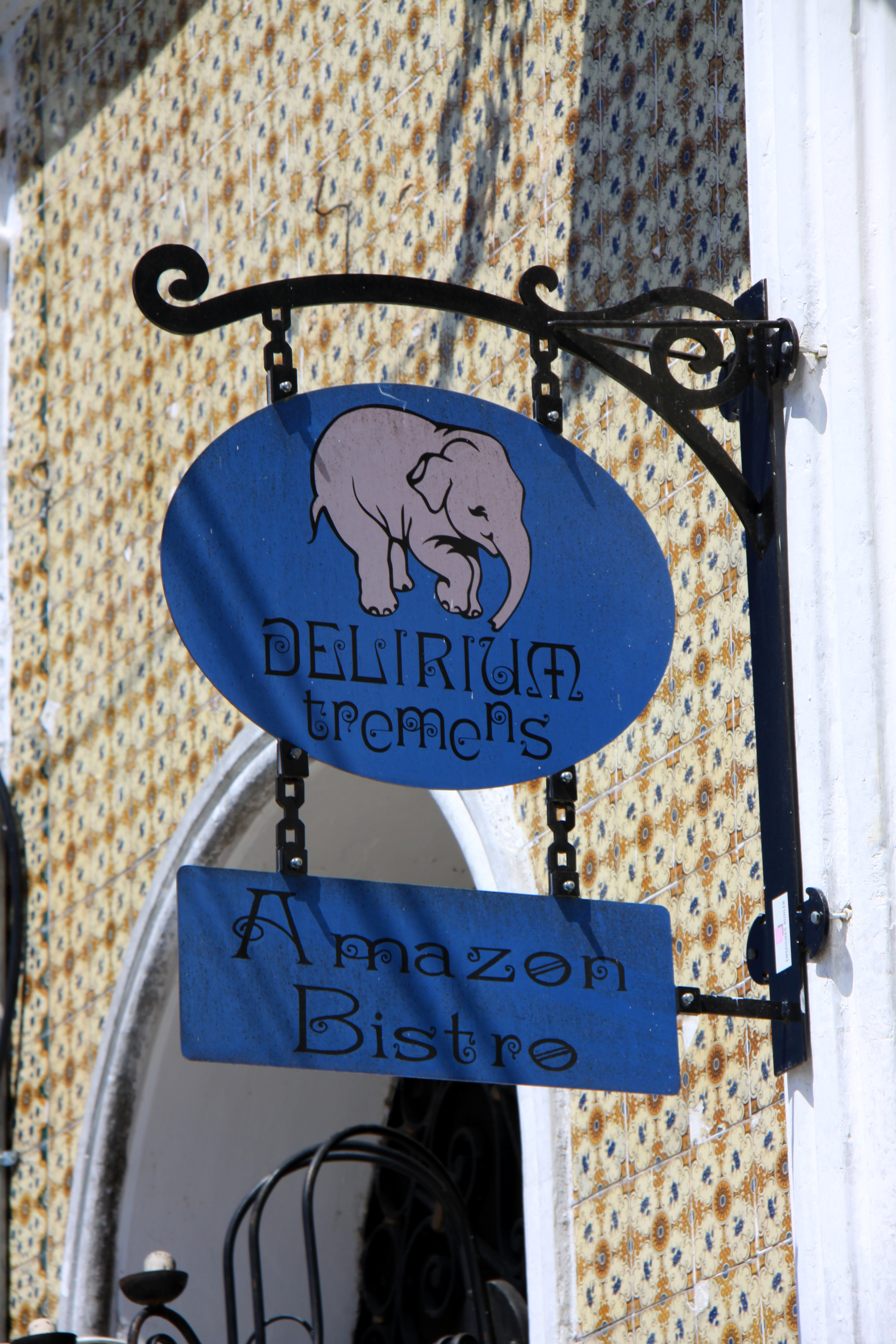 Rótulo de entrada al Amazon Bistro